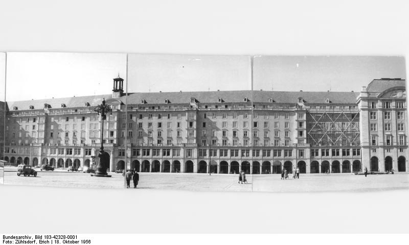 Dresden, Altmarkt, Neubauten Zentralbild Zühlsdorf 18.10.1956 Das neue Dresden. Neubau am Alten Markt. (Aufnahme September 1956)